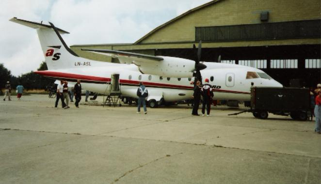 Flydåp på Lista lufthavn